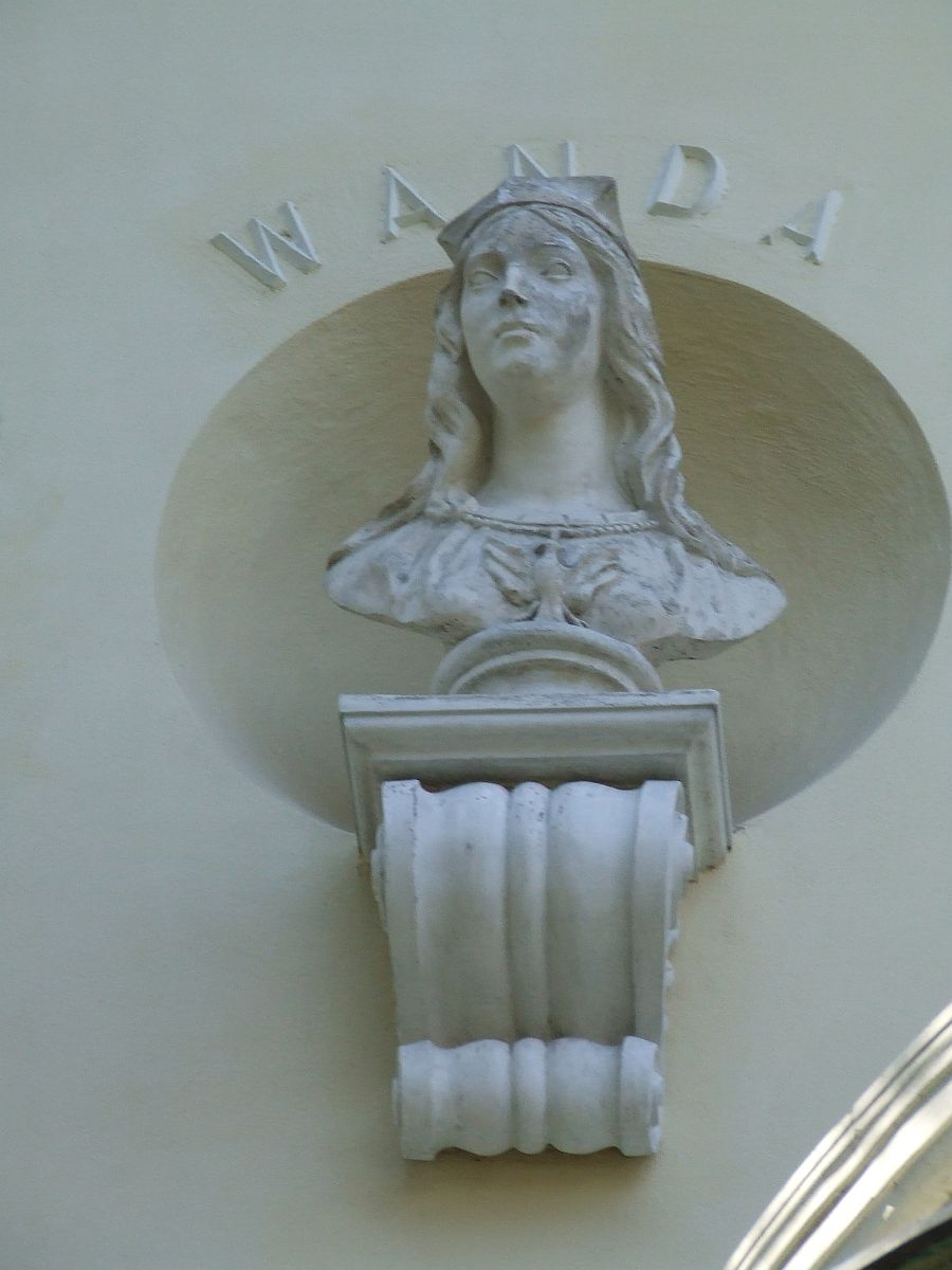 Pałac Juliana Ursyna Niemcewicza, obecnie rektorat SGGW, popiersie Wandy na elewacji pałacu